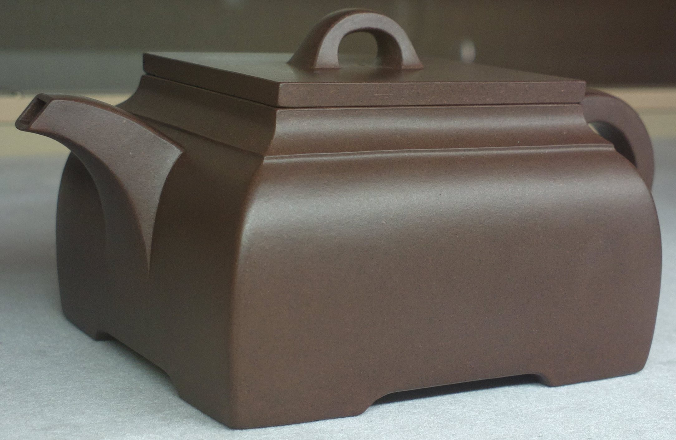 Théière rectangulaire en argile de Yixing ou glaise zisha par Zhou Guizhen. Exposition au Centre culturel de Chine à Paris du 4 au 13 septembre 2013.